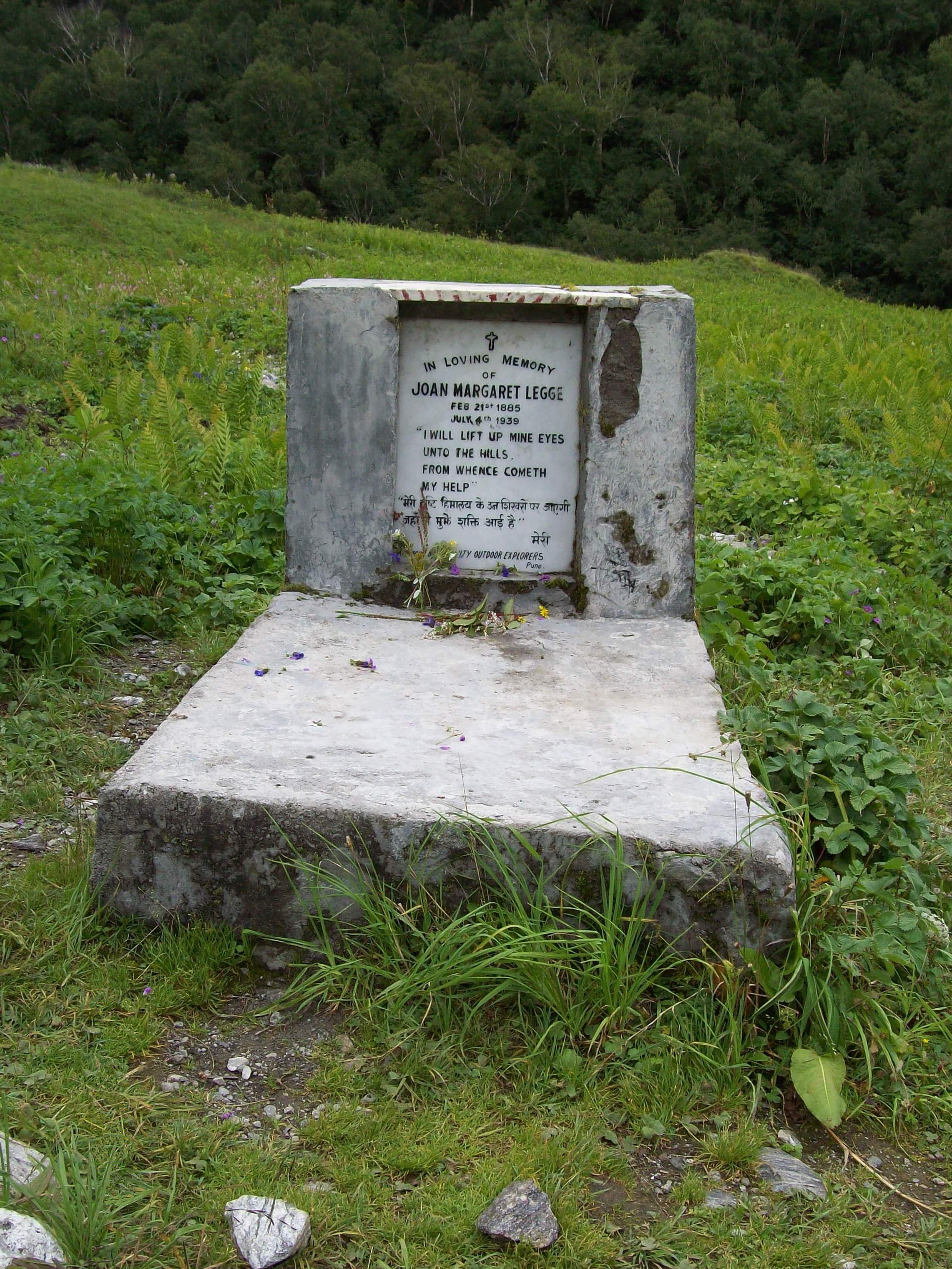 Margaret Legge's memorial grave